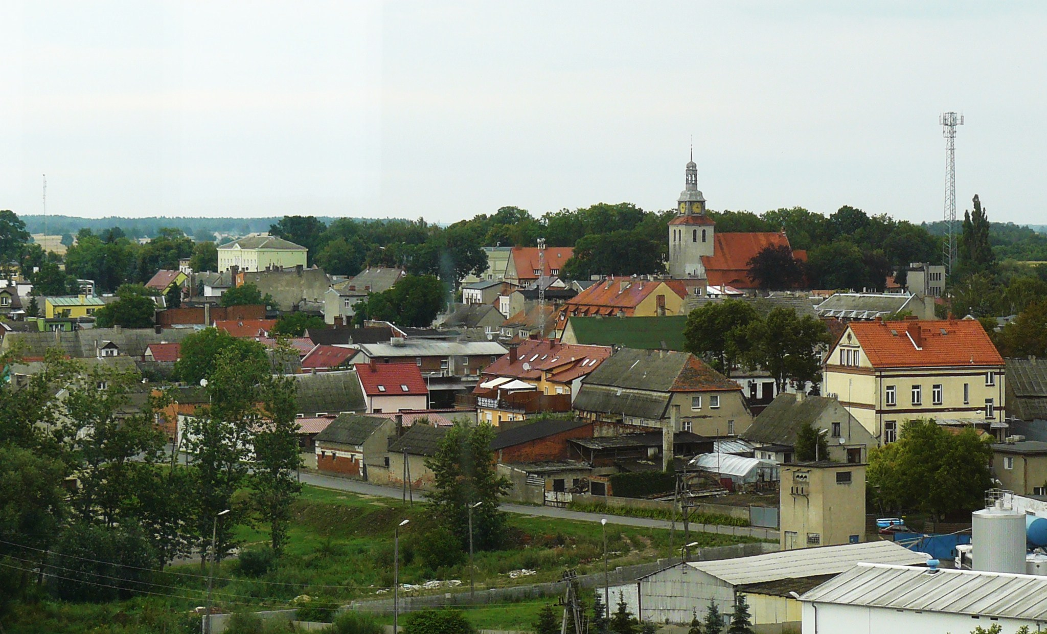 Widok z wieży wodnej w Łobżenicy, która jest punktem widokowym.